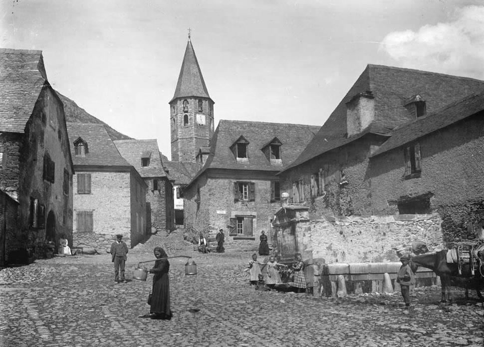 Imatge